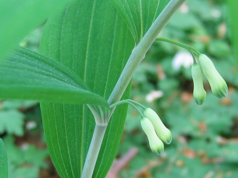 Vielblütige Weißwurz Polygonatum multiflorum, Nähe Rostock